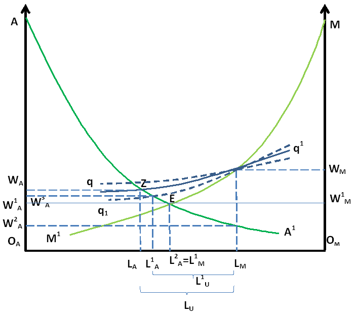 "Миграционная модель Тодаро" из Тодаро М. Экономическое развитие. - М.:Юнити, 1997 - с.249